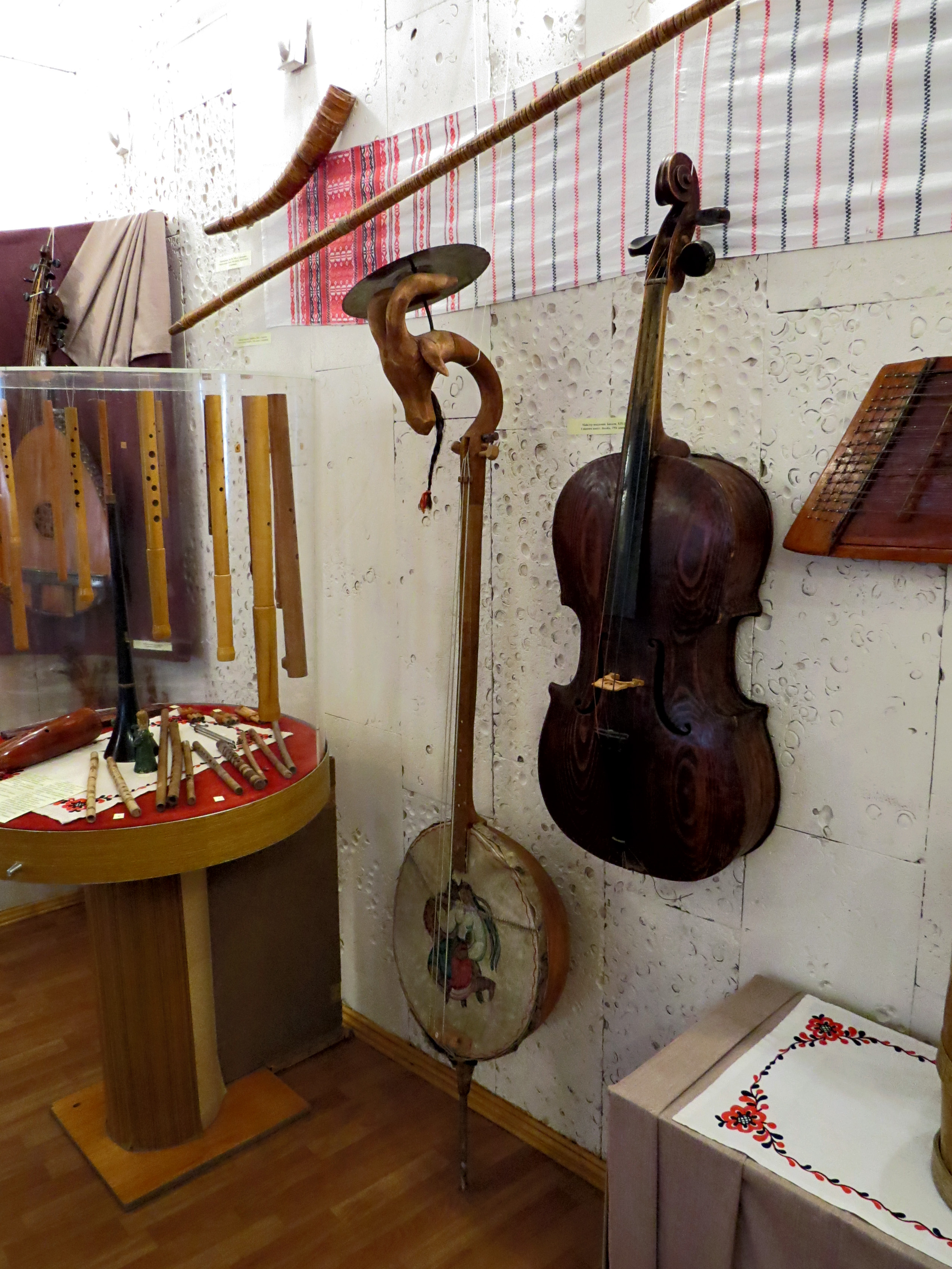 Експозиція Київського музея театрального, музичного та кіномистецтва України. В центрі козобас